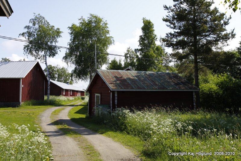 Harrströmin kalasatama ja kylä; rakennettu kulttuuriympäristö Korsnäsissä